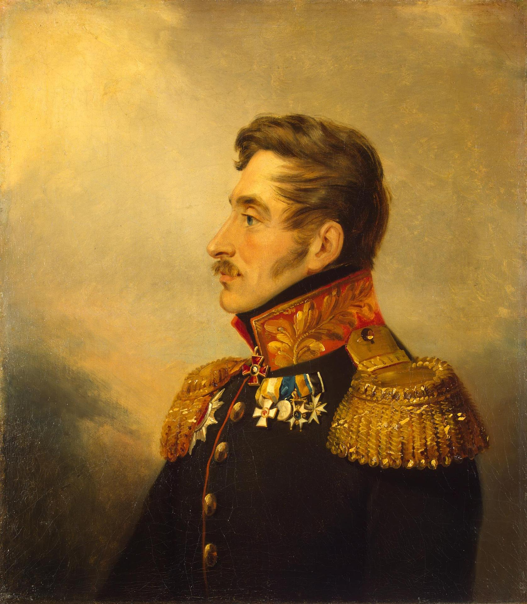 Vasily Petrovich Obolensky (05.01.1780 – 05.02.1834) russian general